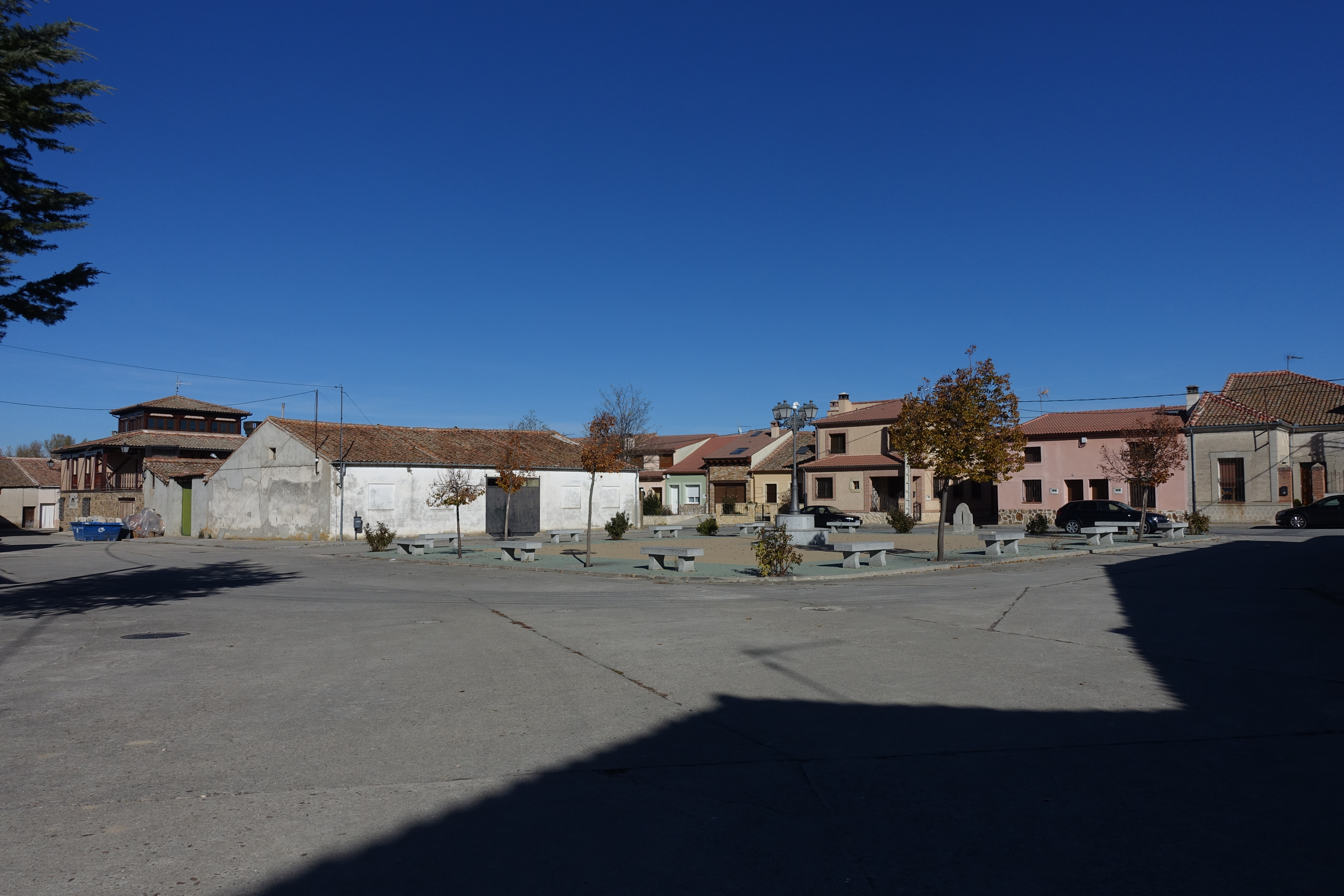 Plaza Mayor de Anaya (Segovia, España).